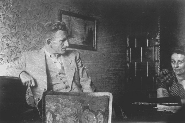 Роман Шухевич із сестрою Наталею.